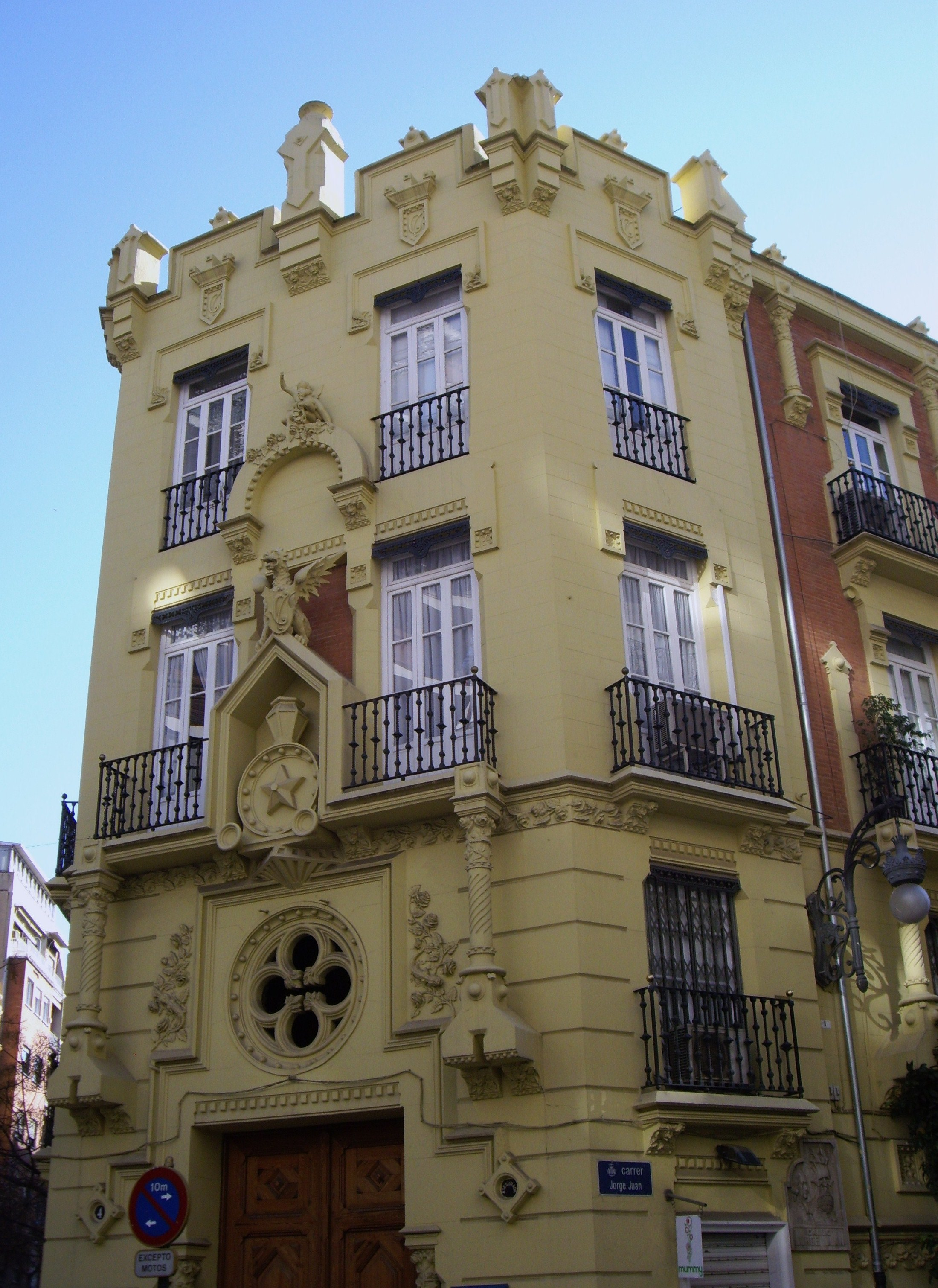 Edifici o casa dels Dracs, València.